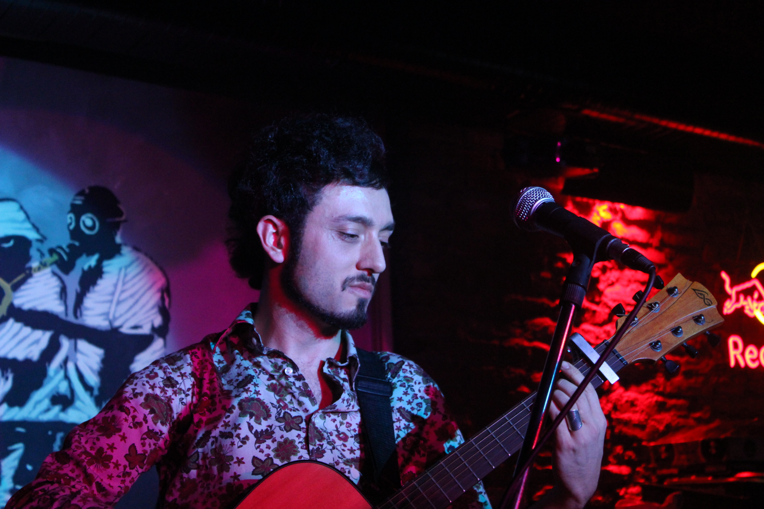 Mabel Matiz, Ankara Passage Pub'da 30 Kasım 2011'de düzenlediği konserinde.